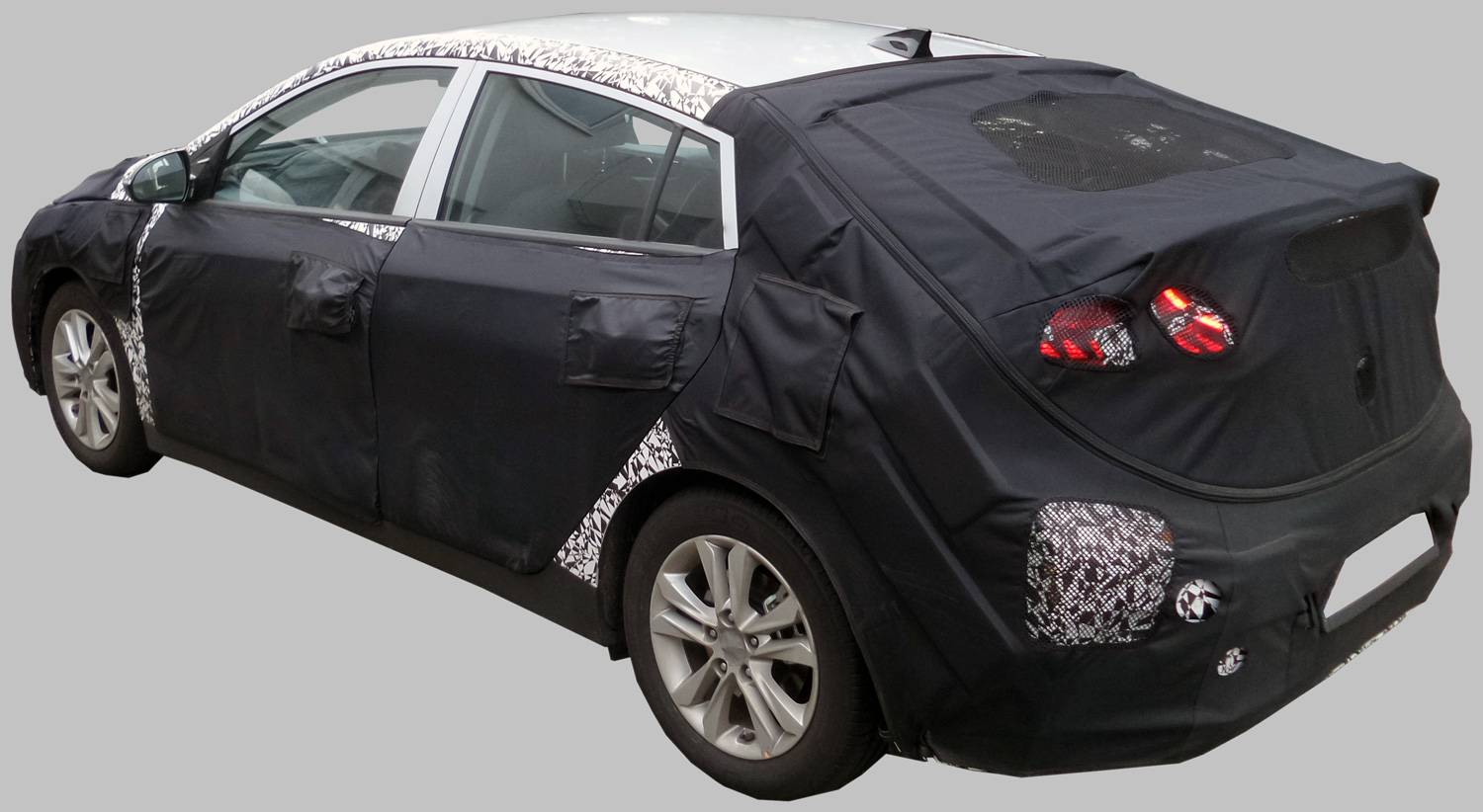 Erlkönig eines Hyundai Ioniq (Marktstart 2016)